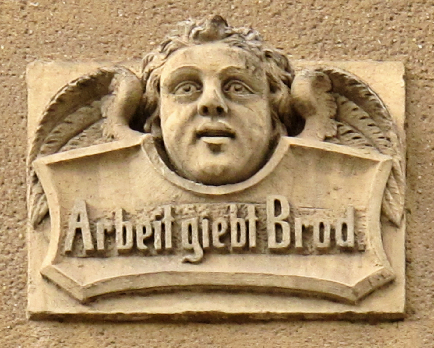 Deutschland, Sachsen, Meißen, Detail an einem Wohnhaus Ende des 19. Jahrhundert